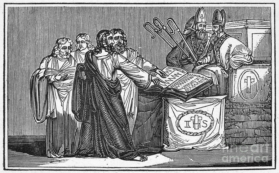 Waldensi na trzecim soborze laterańskim